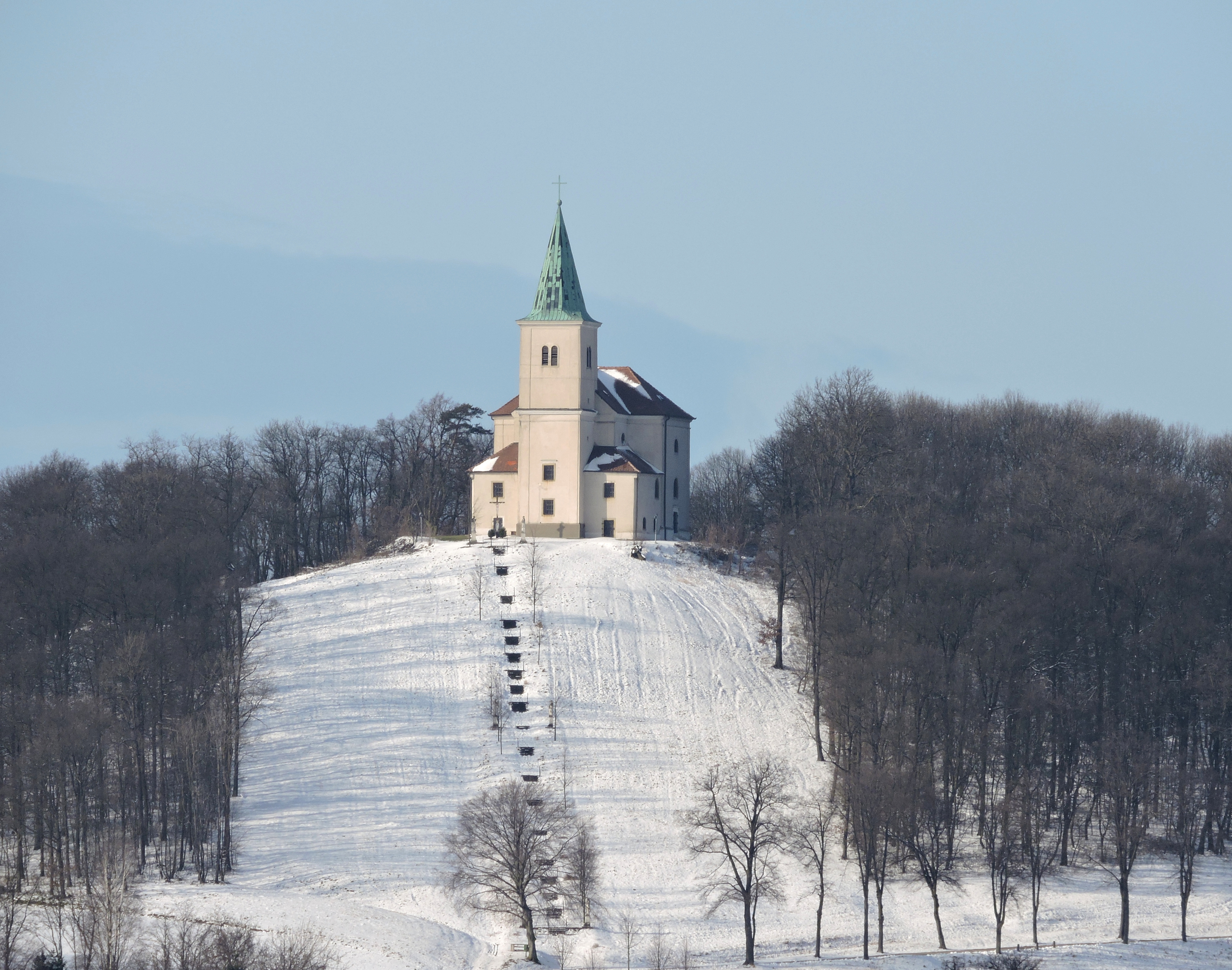 Kath. Pfarrkirche Allerheiligste Dreifaltigkeit